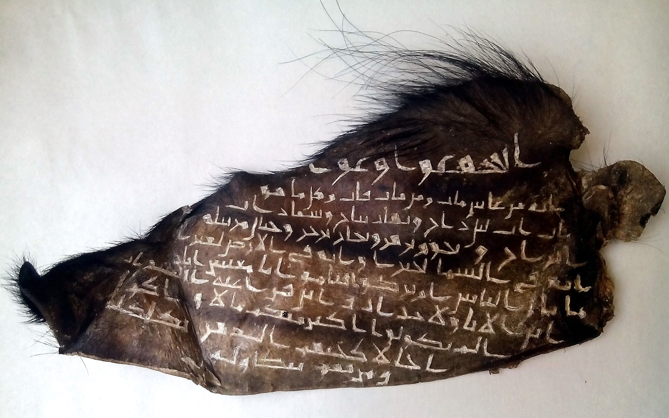 قس بن ساعدہ ایادی کی عکاظ میں تقریر کا ٹکڑا، جسے اسد فاطمی نے خط کوفی و حجازی سے متاثر خط میں خشک حیوانی جلد پر کندہ کیا۔